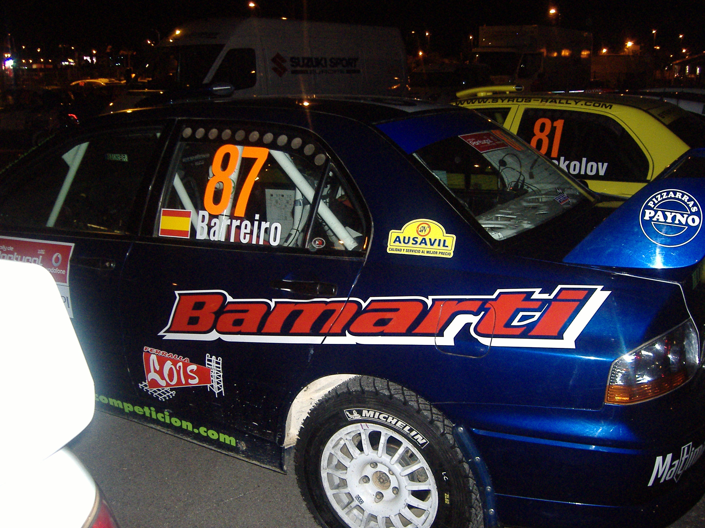 Martinez Barreiro "Bamarti" en el Rally Portugal 2007